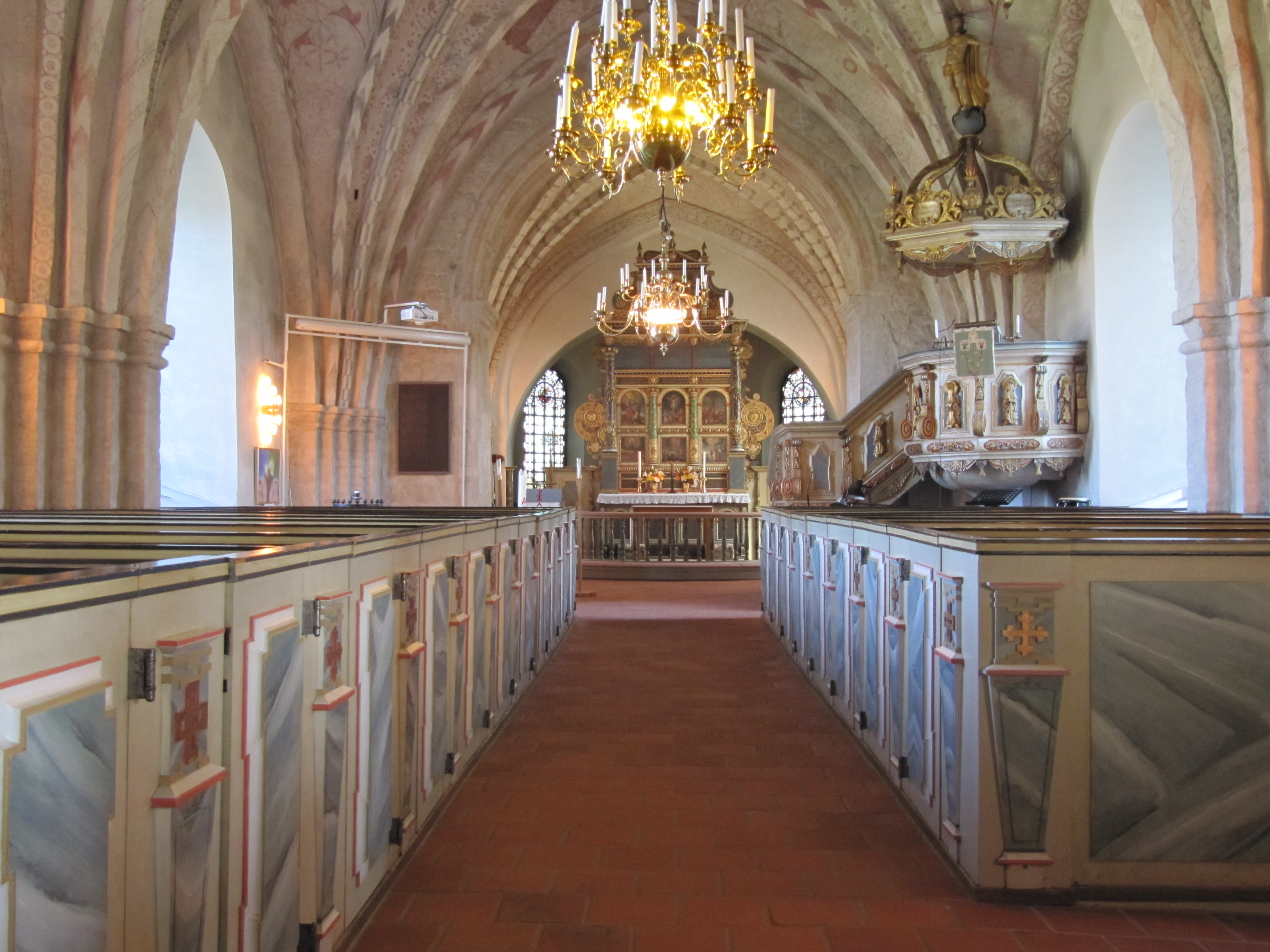 Kyrkorum i Knislinge kyrka